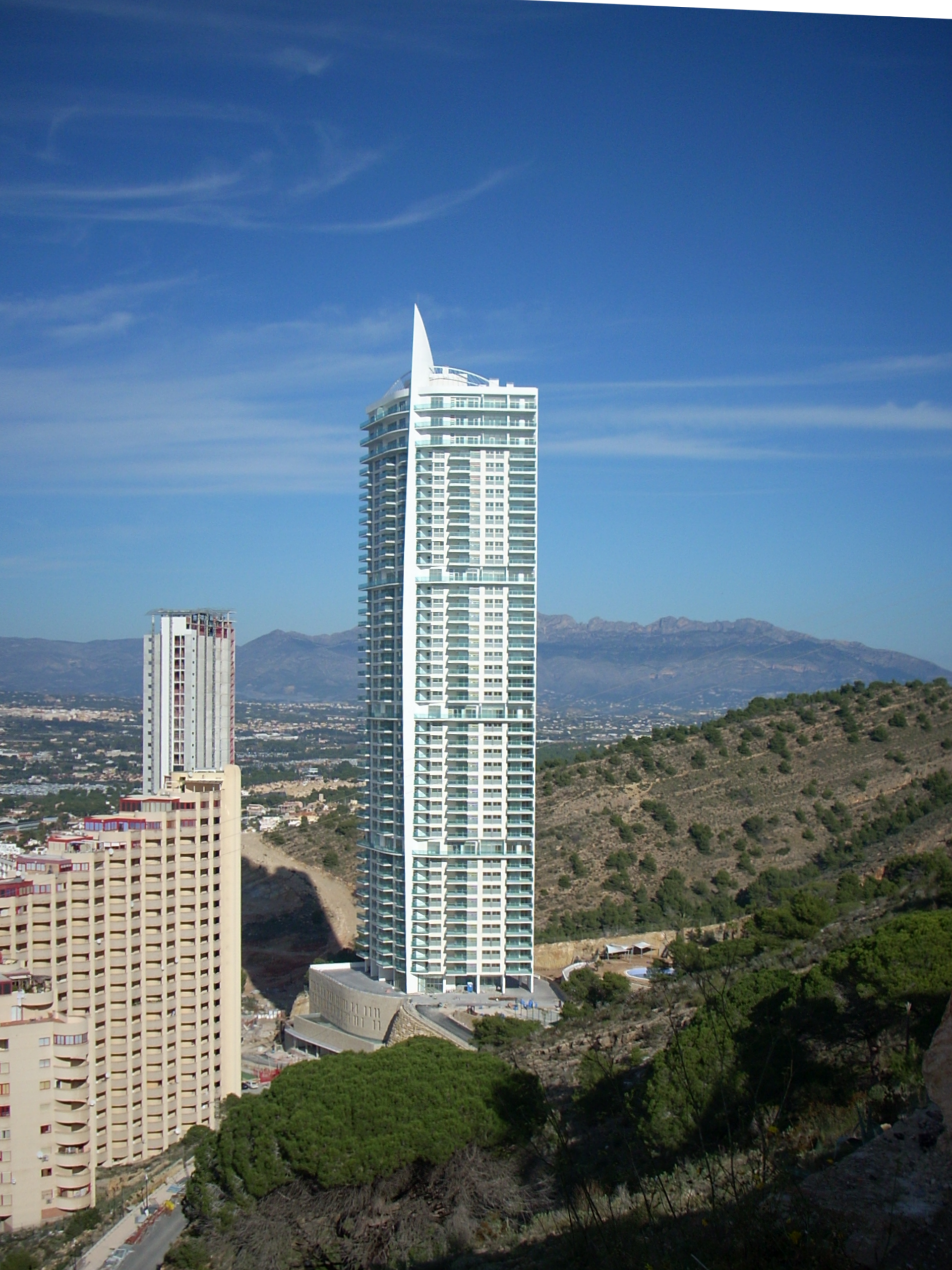 Torre Lugano, en Benidorm, Alicante (España)